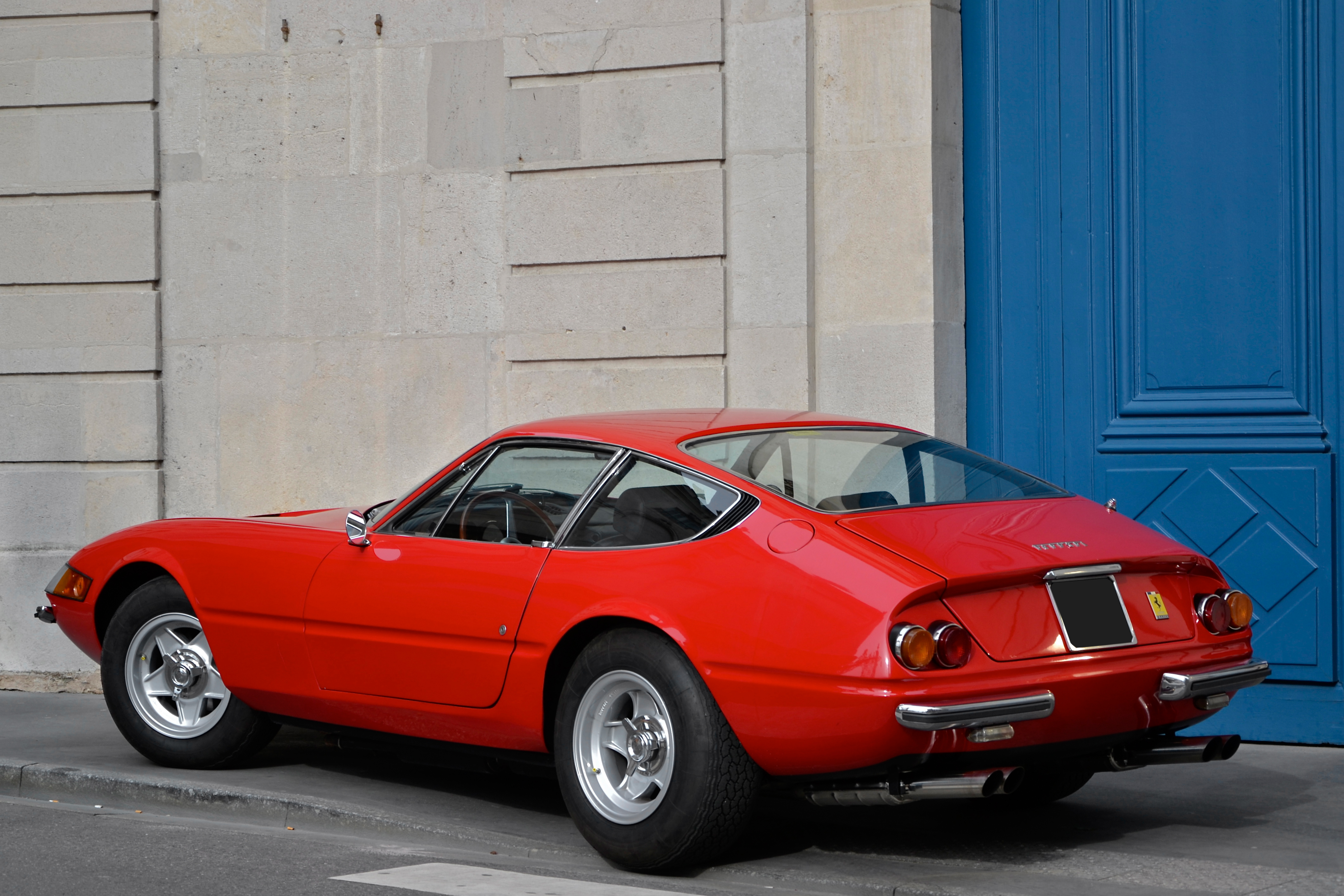 Ferrari 365 Daytona